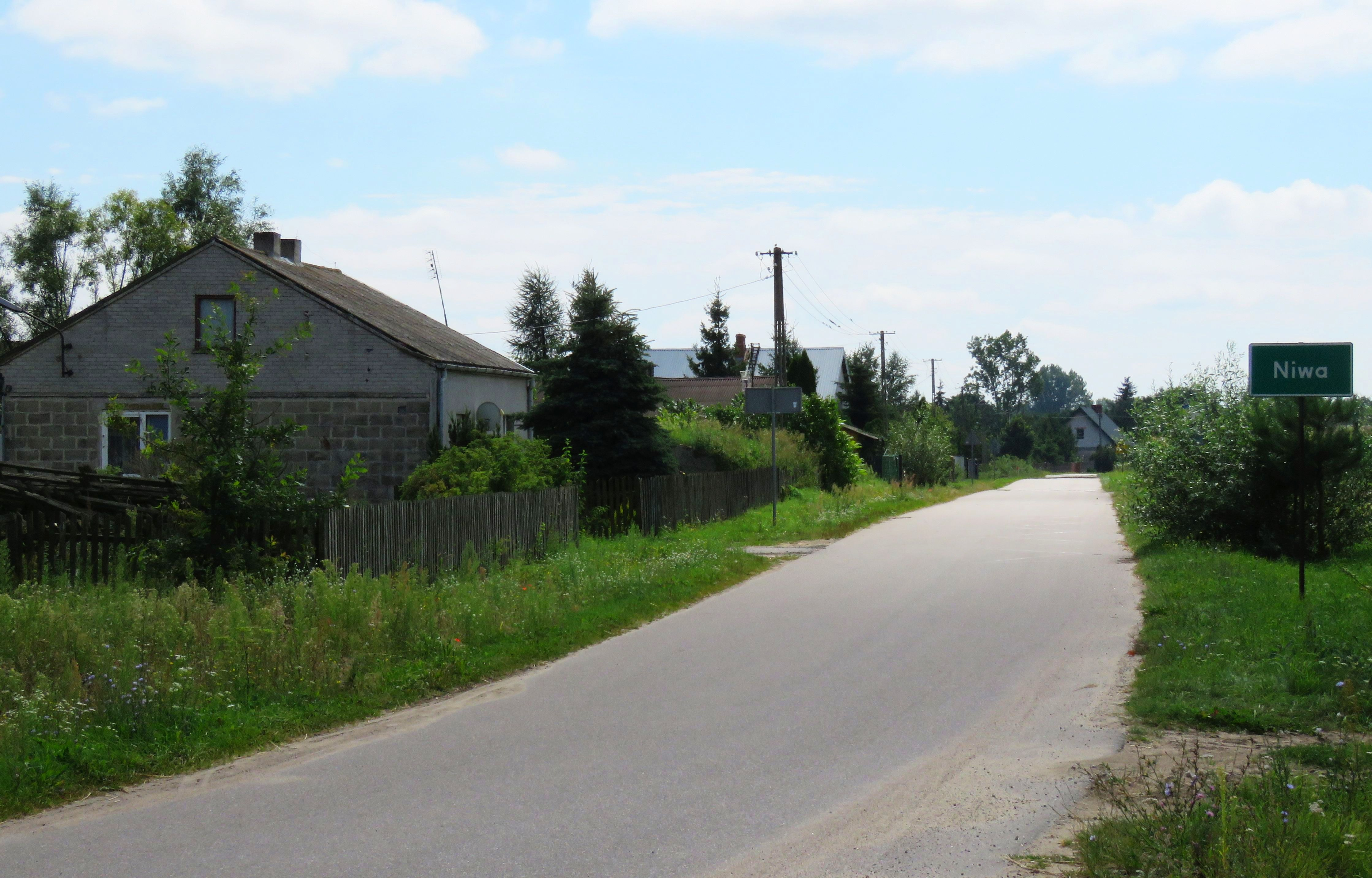 Niwa, gm.Dzierzążnia